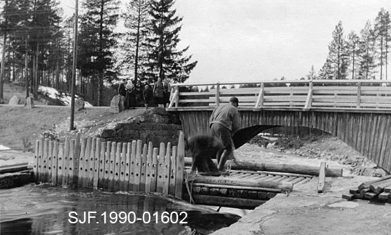 Tapping av Ringlidammen øverst i Julussa, april 1929. Veien over brua er daværende Trysilvegen, nå Ringlivegen etter omlegging av riksvei 25.